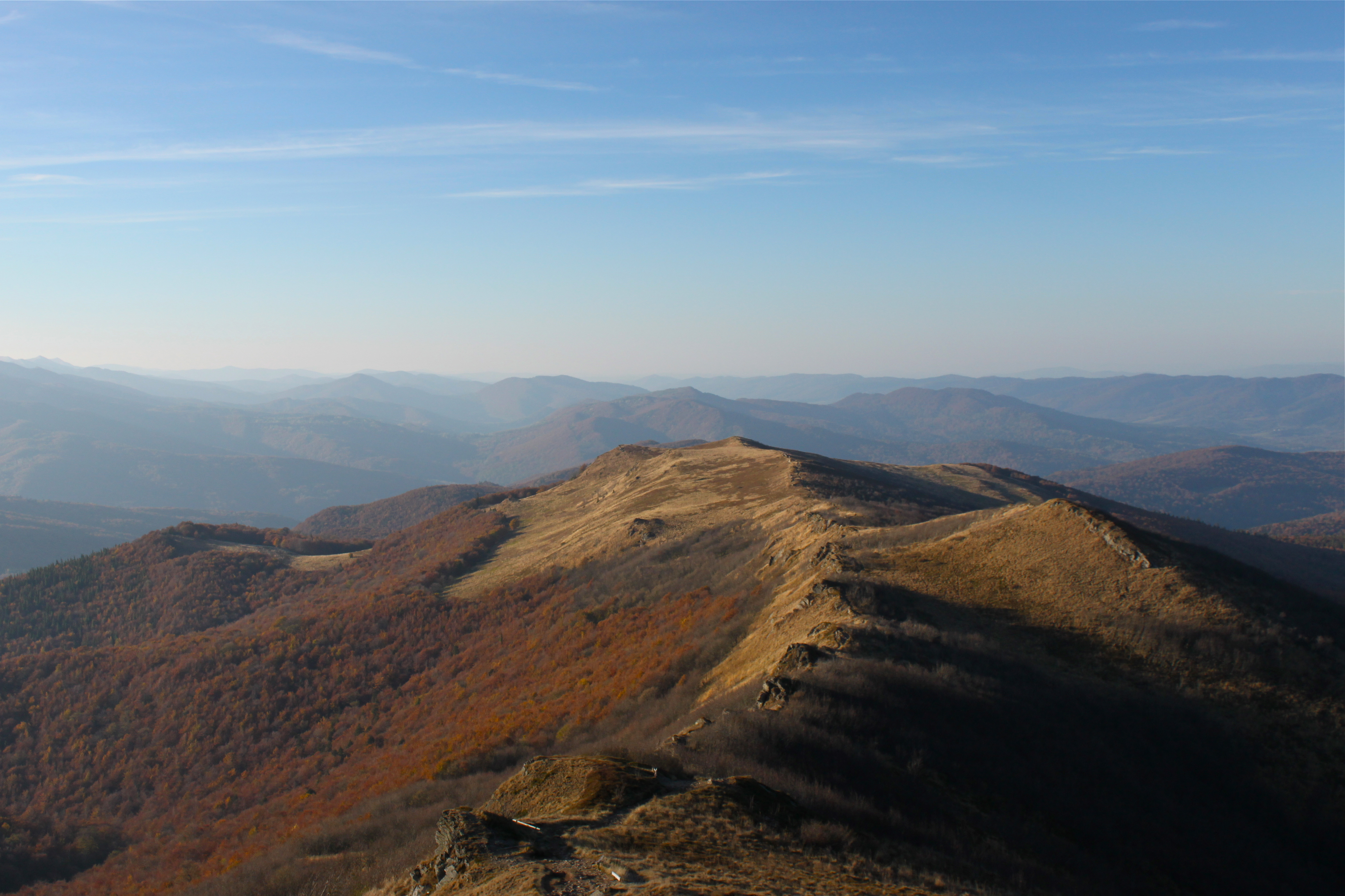 Bukowe Berdo